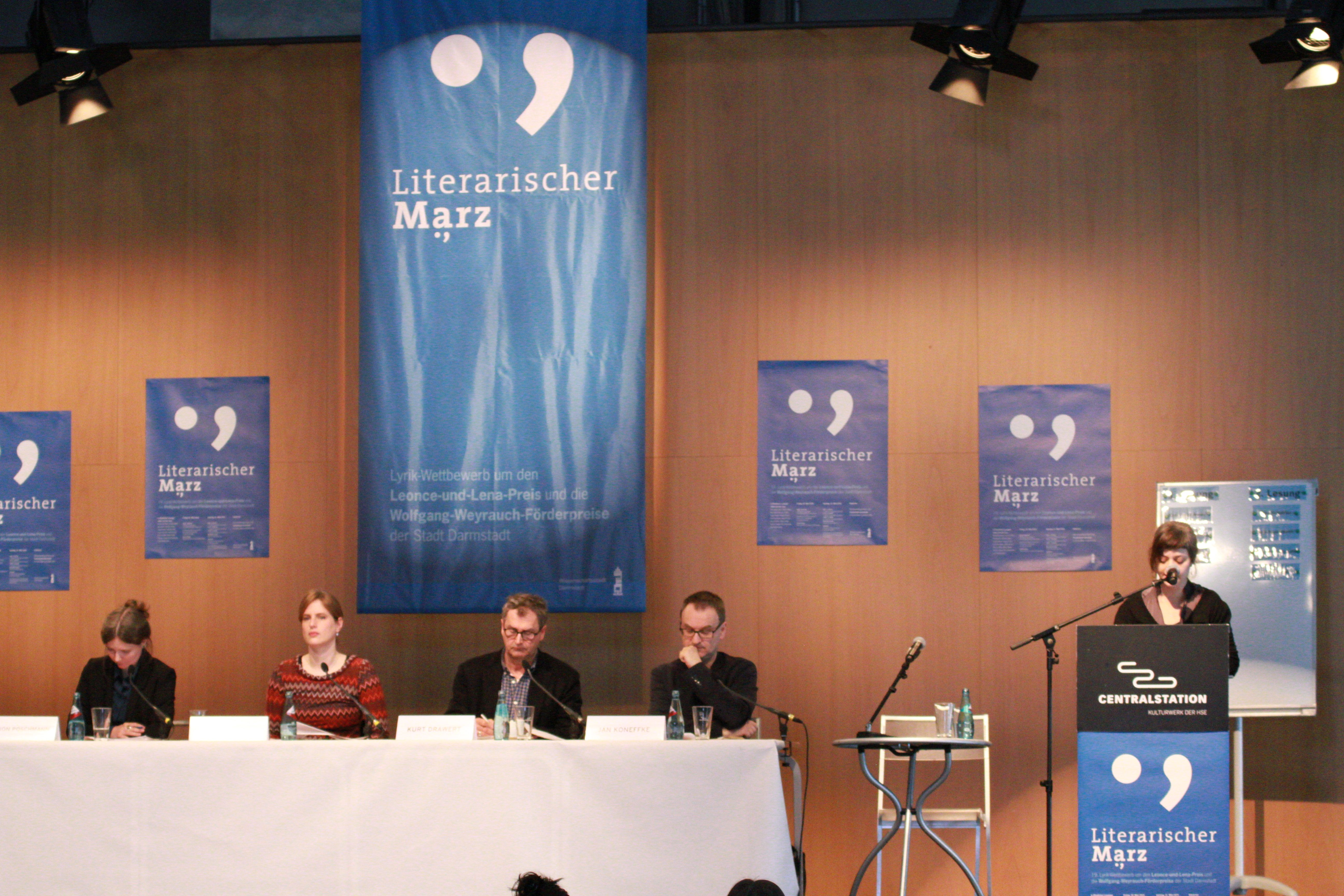 Lesung von Özlem Özgül Dündar, an der Seite (v.l.n.r.) die Jurymitglieder Marion Poschmann, Insa Wilke (Moderatorin), Kurt Drawert und Jan Koneffke